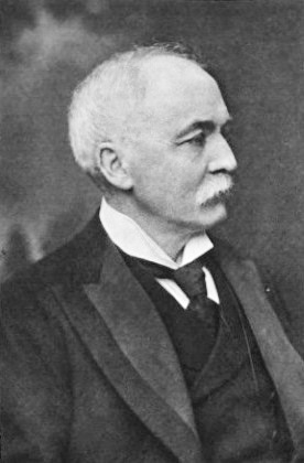 Sir William Bilsland